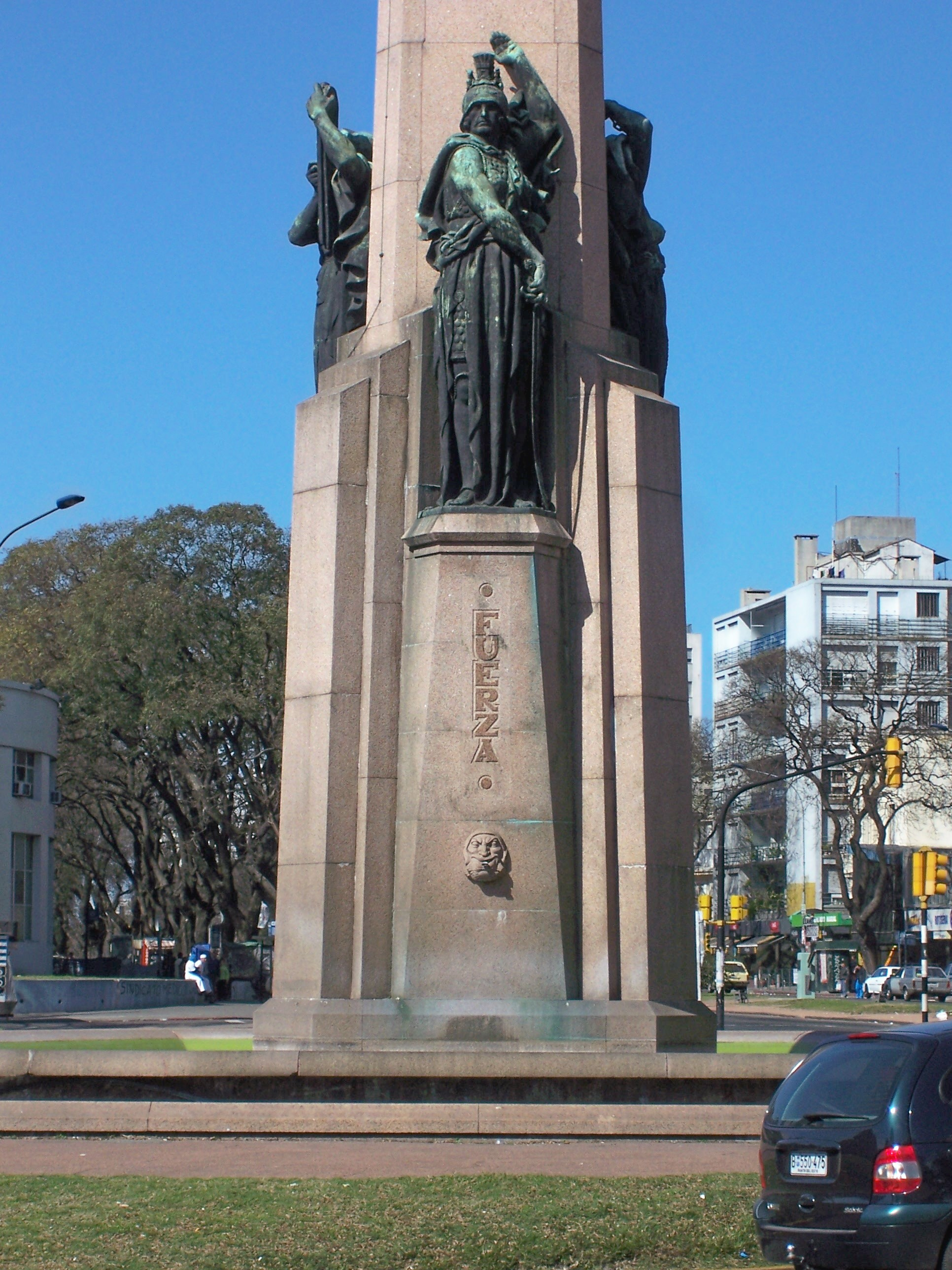 Obelisco de homenaje a los Constituyentes de 1830, obra de José Luis Zorrilla de San Martín, ubicado en Montevideo, Uruguay.